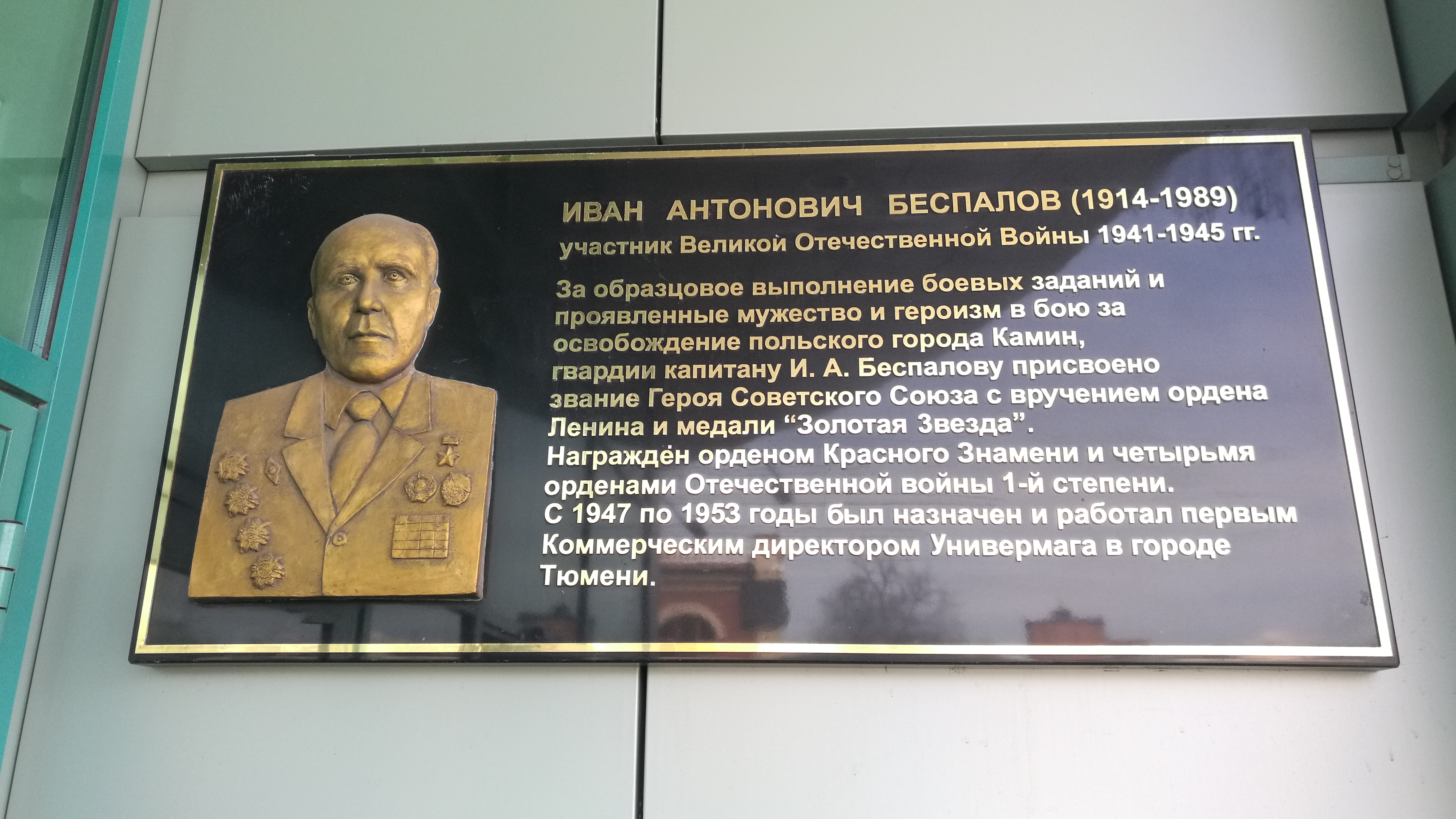 Memortabulo pri Ivan Bespalov, Heroo de Sovetunio, veterano de la Dua mondmilito, sur la aĉetcentro CUM. Tjumeno, Rusio.